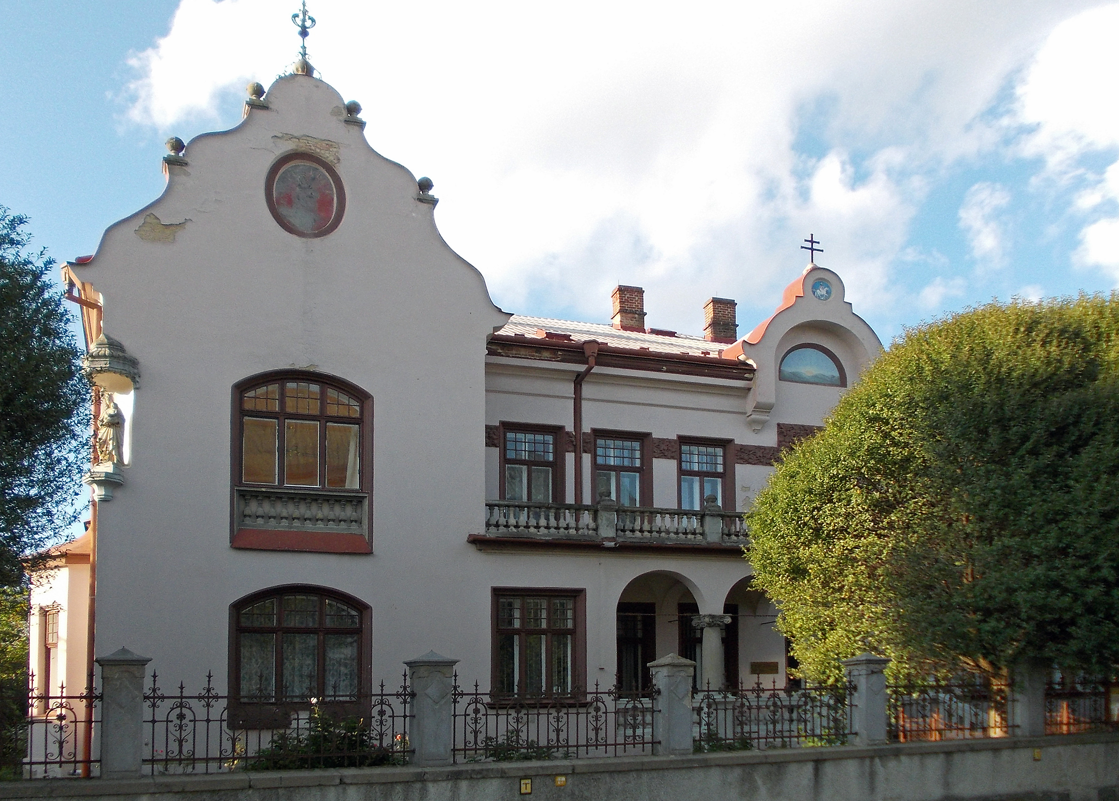 Fara, náměstí Osvobození 27/7, Pod Bezručovým vrchem, Krnov.